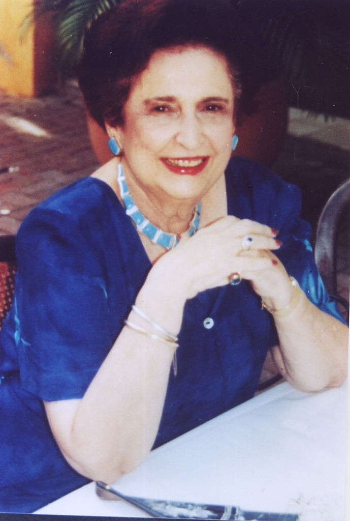 Picture of Teresita Román de Zurek